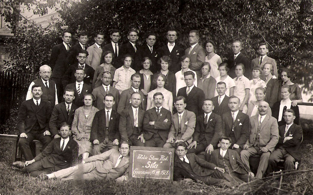 Group photo of the Polskie Stowarzyszenie Robotnicze "Siła" (Polish Workers' Association "Power") Gruszów